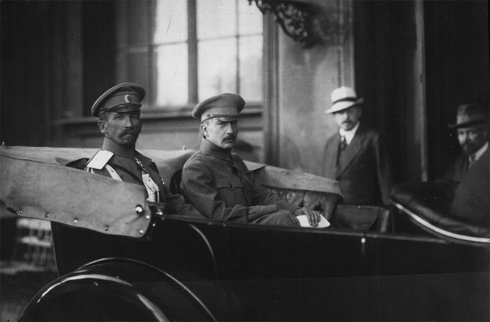 Llegada de Kornilov y Savinkov a la Conferencia estatal de Moscú.